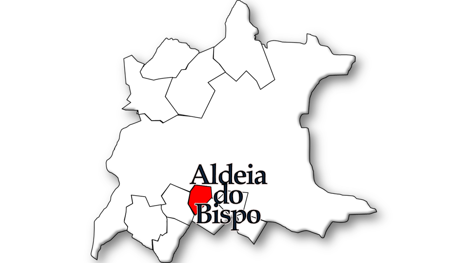 População